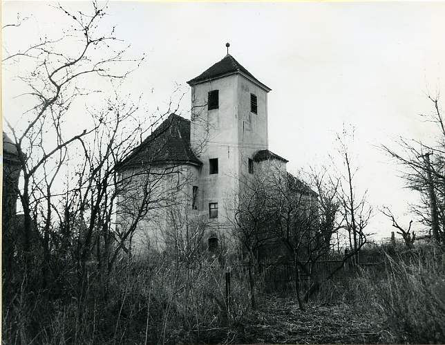 Kostel v Albrechticích před demolicí v 70. letech 20. století.